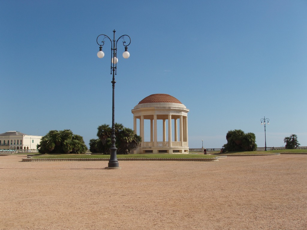 Livorno, Italy: Terrazza Mascagni. The gazebo by Ghino Venturi